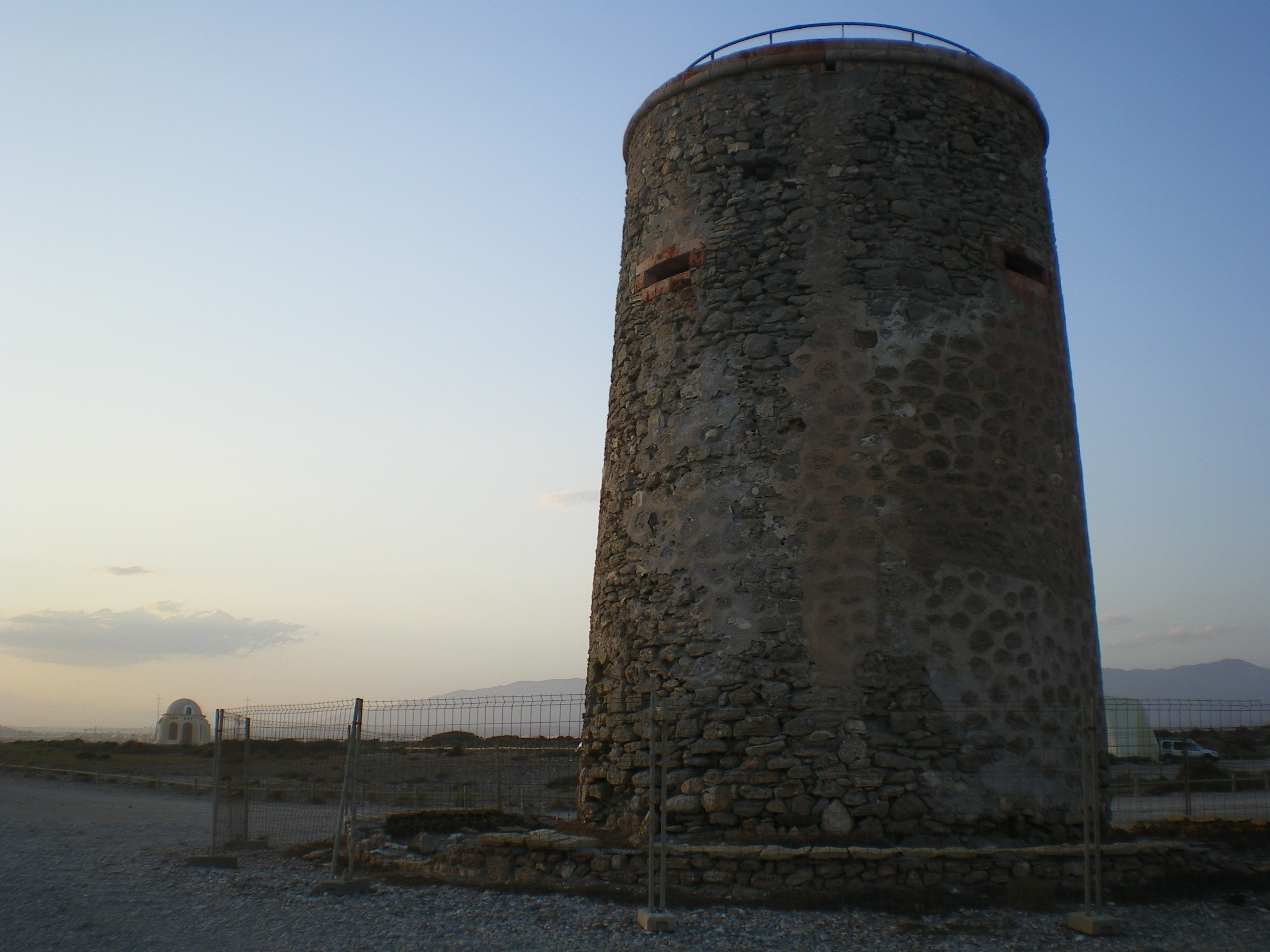 Fotografía de la Torre García, desde sur levante, con la Ermita del mismo nombre al fondo; Almería, Andalucía, España.